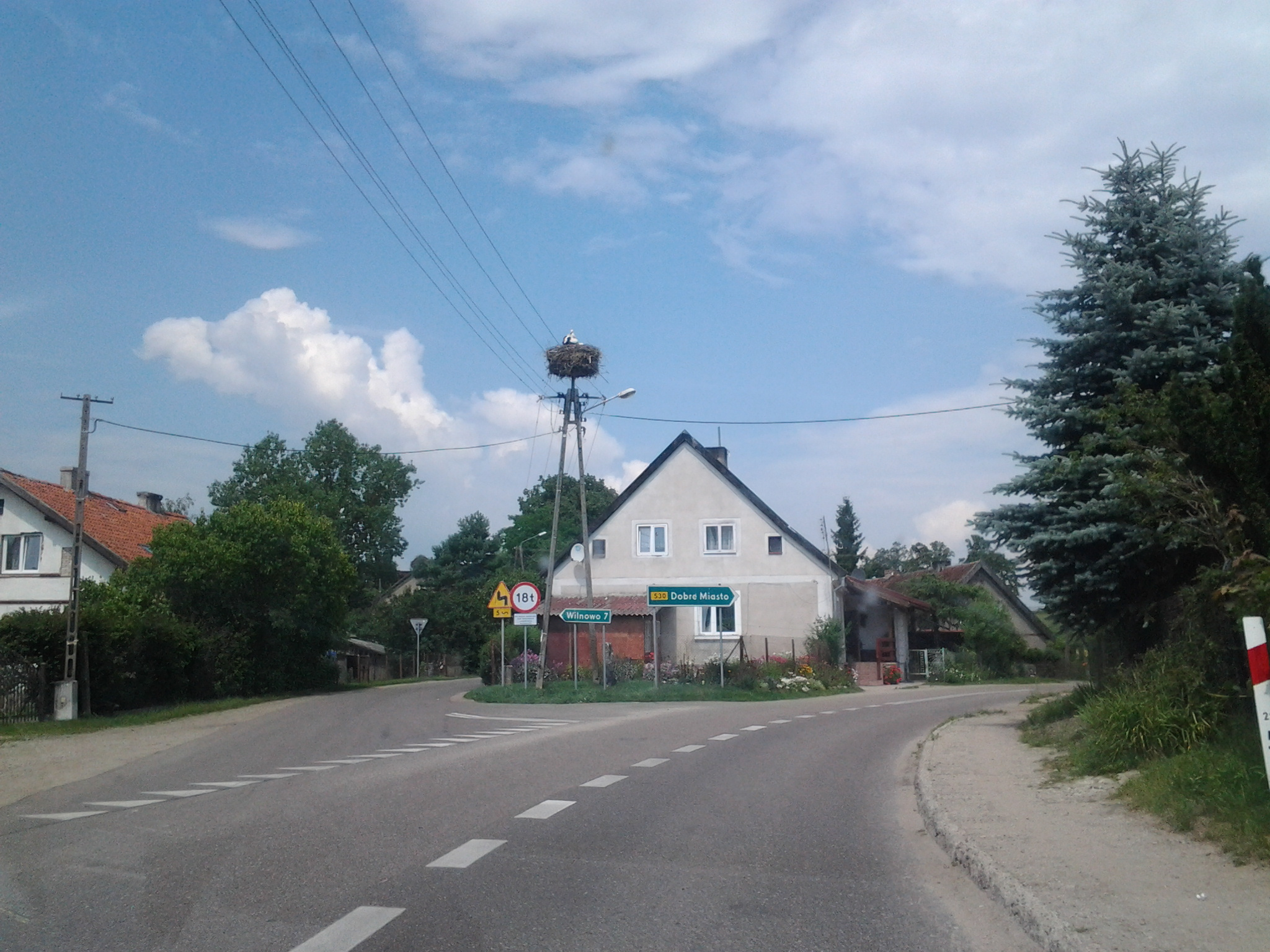 Bocianie gniazdo w Mostkowie